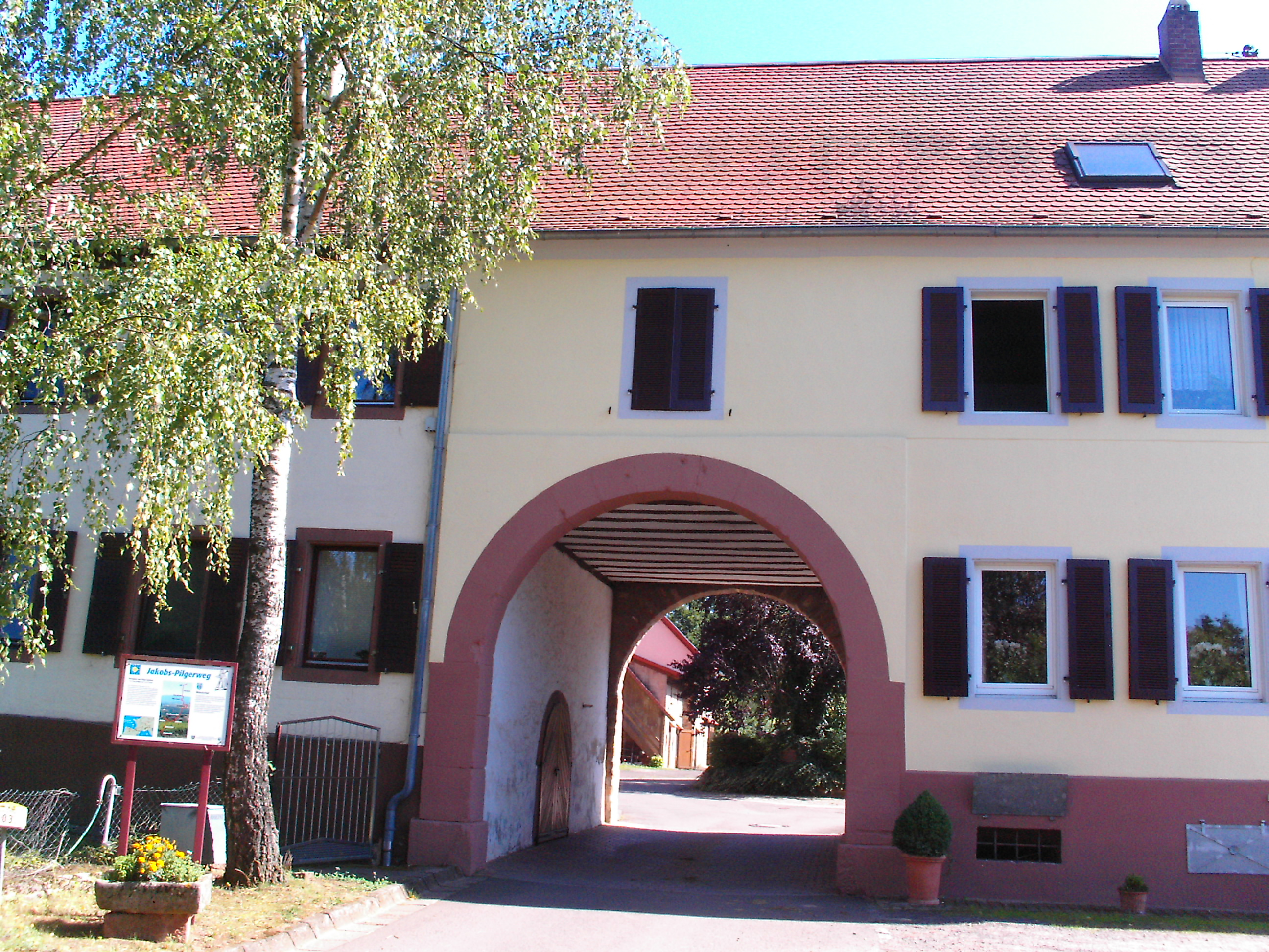 Münsterhof bei Dreisen, Rheinland-Pfalz (ehem. Kloster Münsterdreisen).